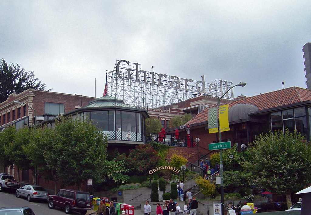 Ghirardelli Square in San Francisco, California